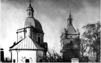 Սուրբ Նիկողայոս եկեղեցին և Ստեփանոս զանգակատունը